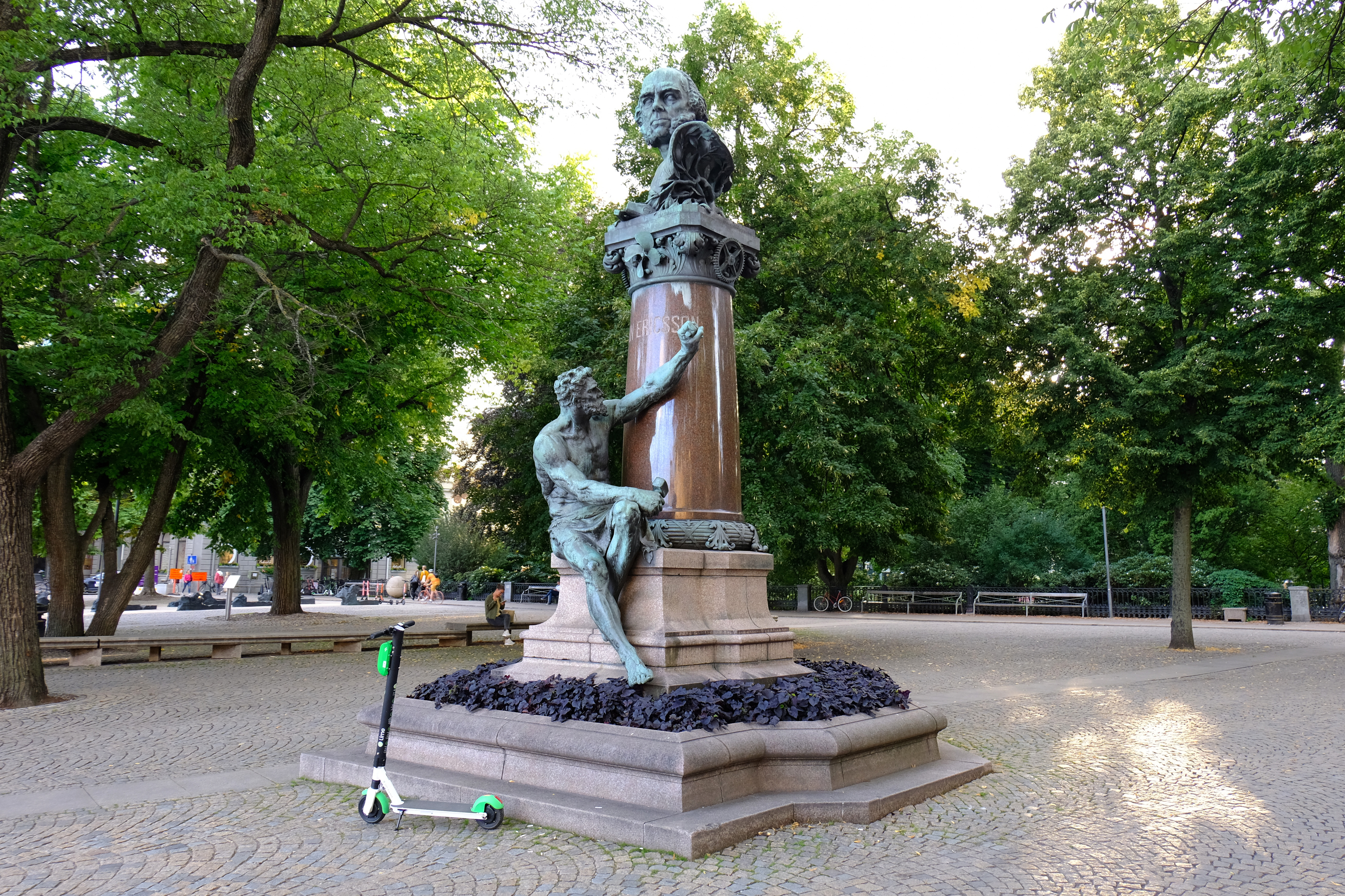 John Ericsson-Statue aus Bronze und Porphyr von John Börjeson, Nybroplan, Stockholm, Schweden (1901)